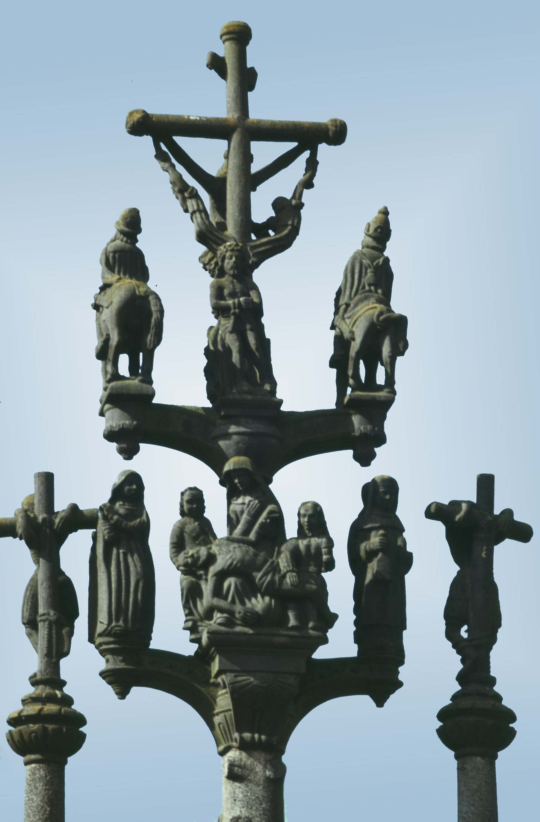 Saint-Thégonnec